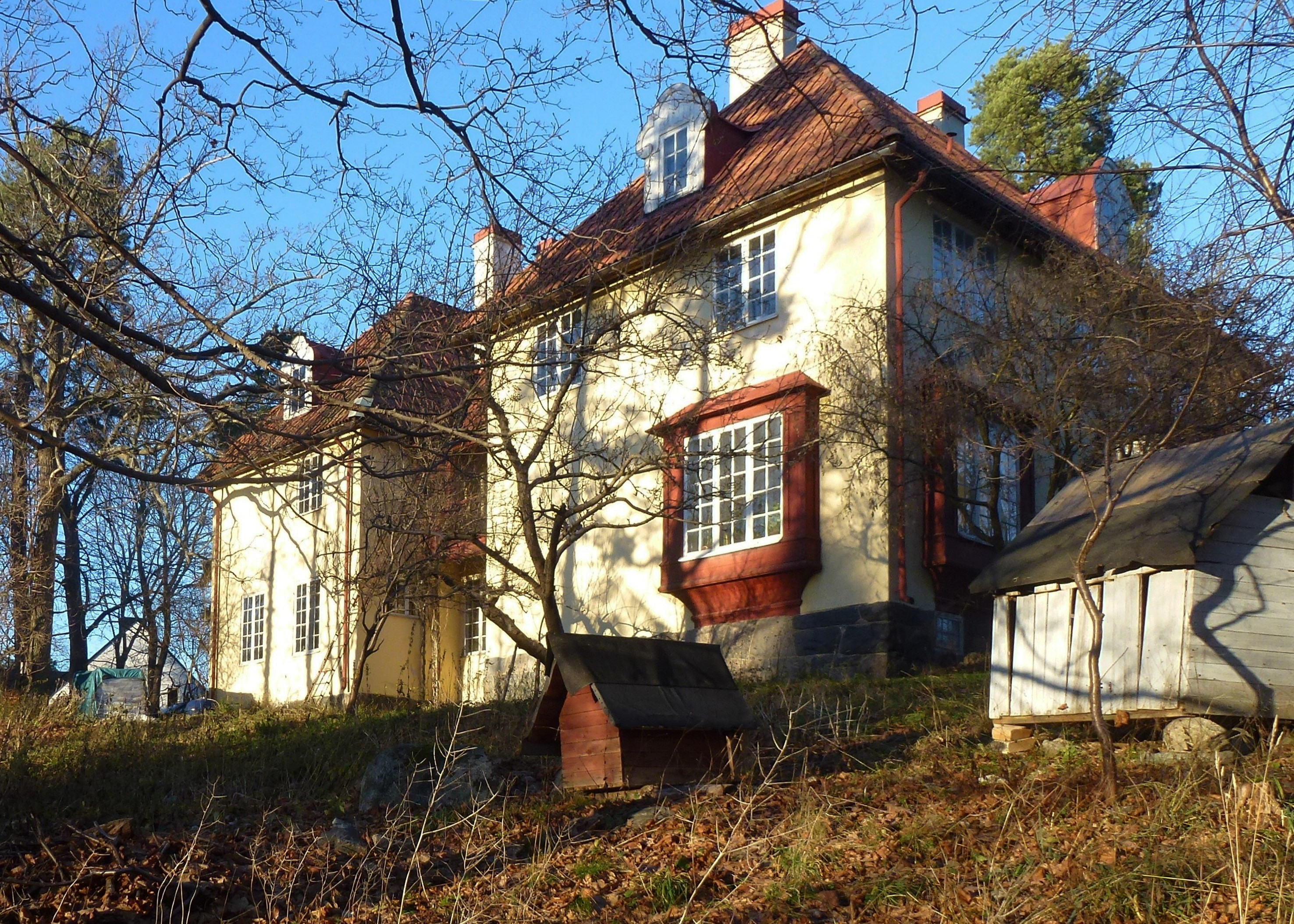 Villa Kallstenius även Kallstena, Krokvägen 1B, arkitekt Gustaf Petterson (1855-1933)